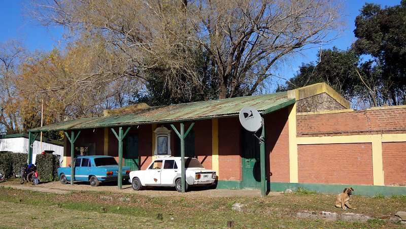 Estación Cucullú del FCGU, ramal Lacroze - Rojas